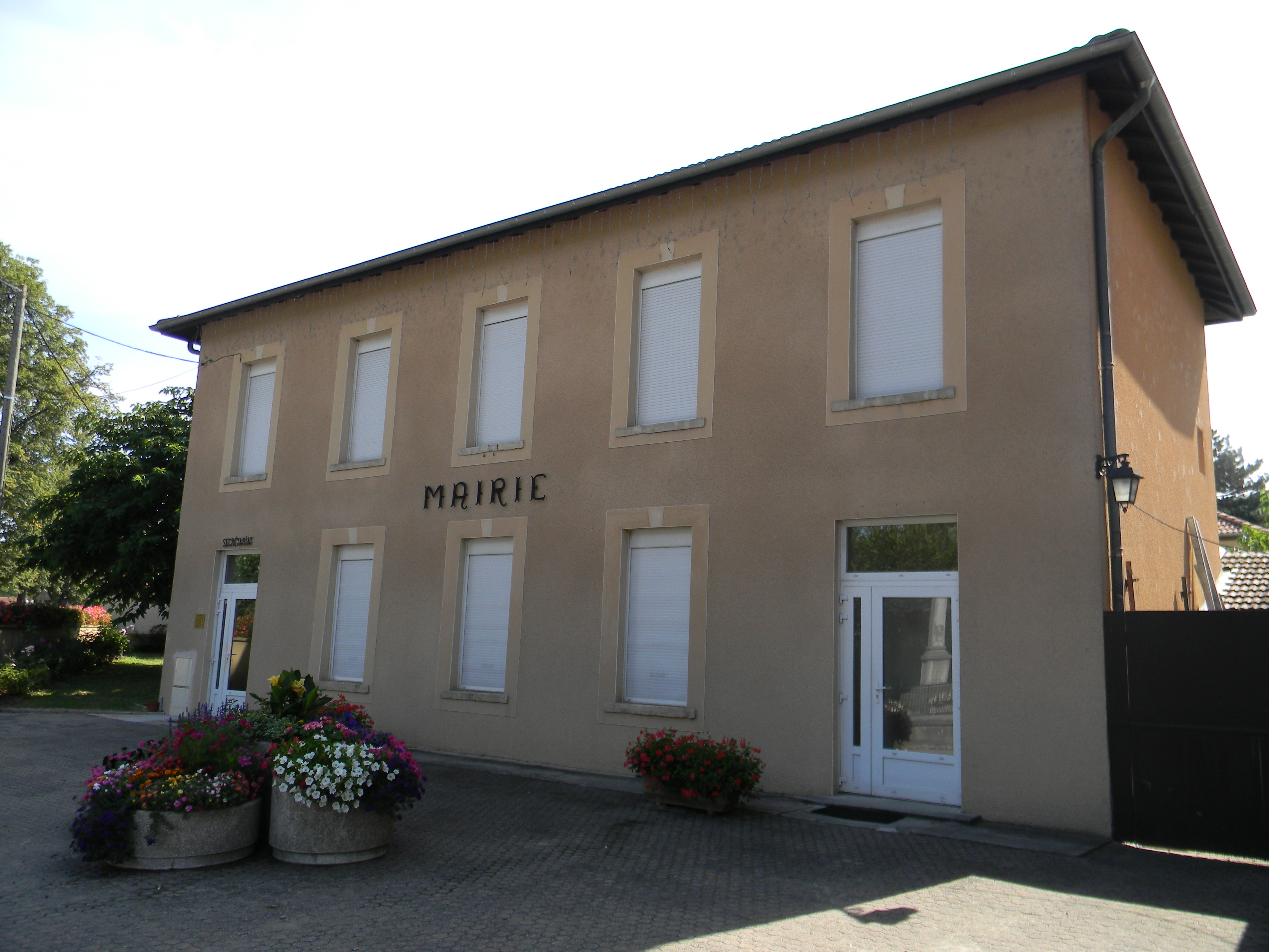 Mairie de Chamagnieu.